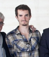 En el estreno de "Gernika bajo las bombas"